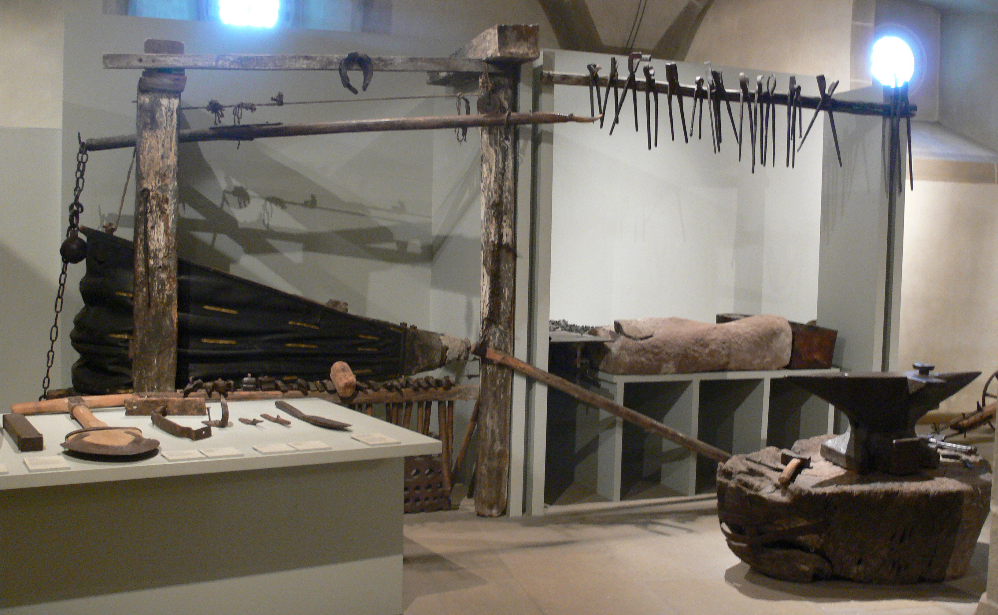 Ländliche Schmiede Landesmuseum Württemberg (Außenstelle: Museum für Volkskultur Waldenbuch)